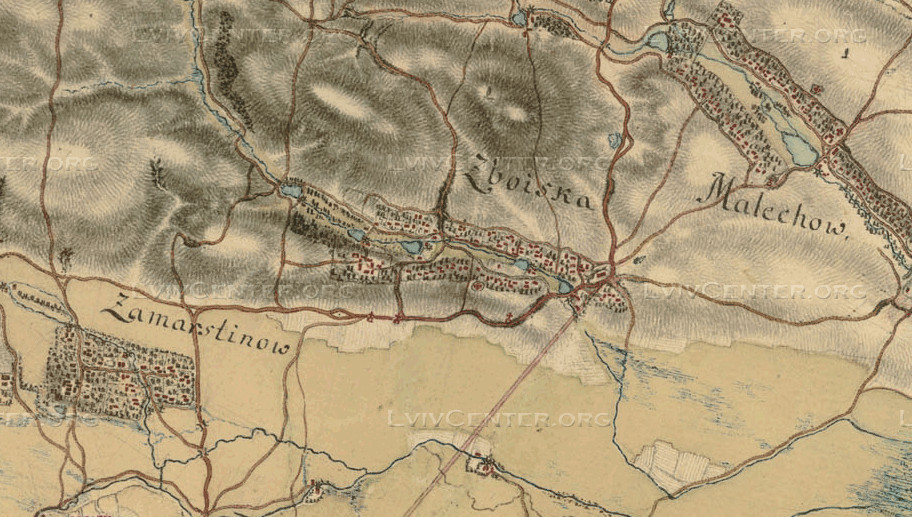 Збоїща на мапі 18ст. 1779-1782рр. створена австрійським обер-лейтенантом Фрідріхом фон Мігом ця карта є величезною вона охоплює всю провінцію Галичинни та Володомирії та ще безліч карт які створив Фрідріх Фон Міг ці всі карти відомі під назвою "карти Фон Міга"